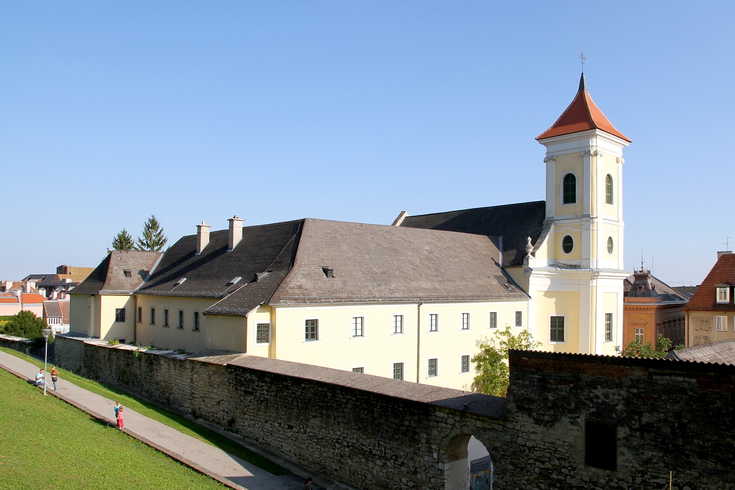 Das Franziskanerkloster in der burgenländischen Stadt Eisenstadt. Im Vordergrund die alte Stadtmauer.